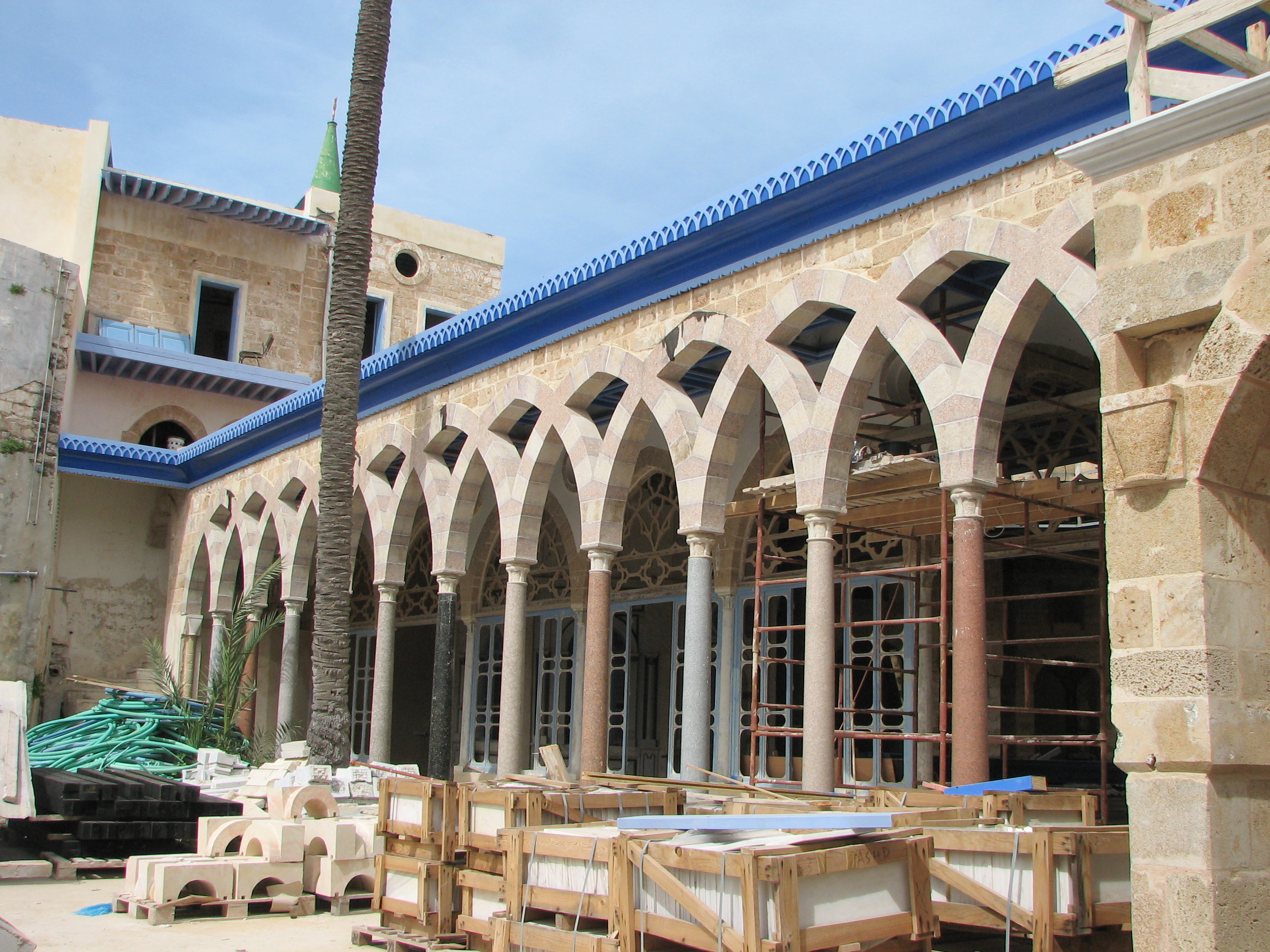 Akko, El Shazliya Mosque under construction. The cost of construction is estimate 80 M $ מסגד אל -שאזליה בעכו. מרכז השאזלים נמצא בלבנון. במשך שנים מרכז זה נזנח והשוכרים הרחיבו את בתיהם. השאזלים החליטו לשפץ אץ המקום הם פינו את הדיירים תוך מתן פיצויים והחלו בשיפוץ האתר הכולל מסגד מבנים וקברים. ההשקעה המוערכת במבנה באתר היא 80 מליון דולר This image was taken as part of the Elef Millim project trip to the Old City of Acco, which was held on Friday, 5th March 2010. To view all images uploaded as pary of the Elef Millim Project קירות פנימיים בזמן השיפוץ